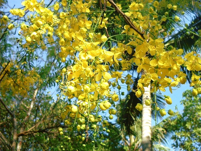 കൊന്നപ്പൂവ്